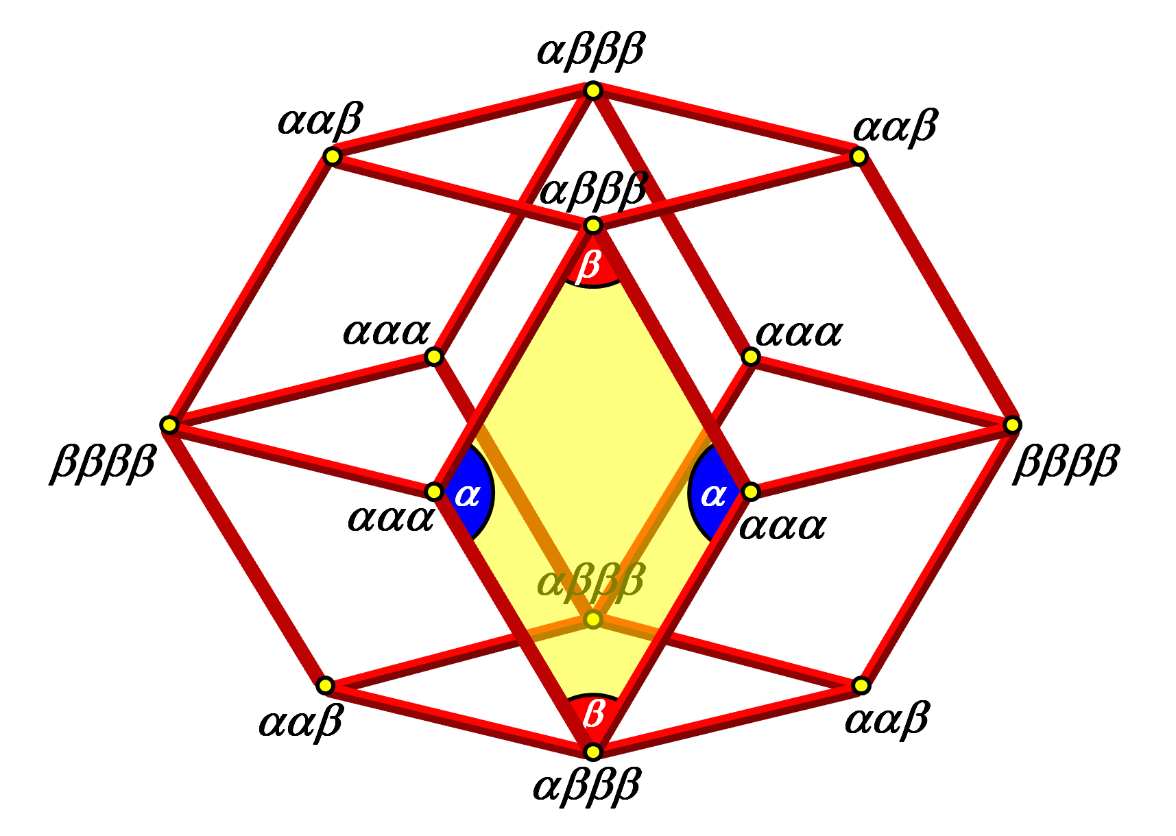 Sono indicate le diverse combinazioni degli angoli dei rombi aurei che confluiscono in ciascuno dei 14 vertici del Dodecaedro rombico aureo.